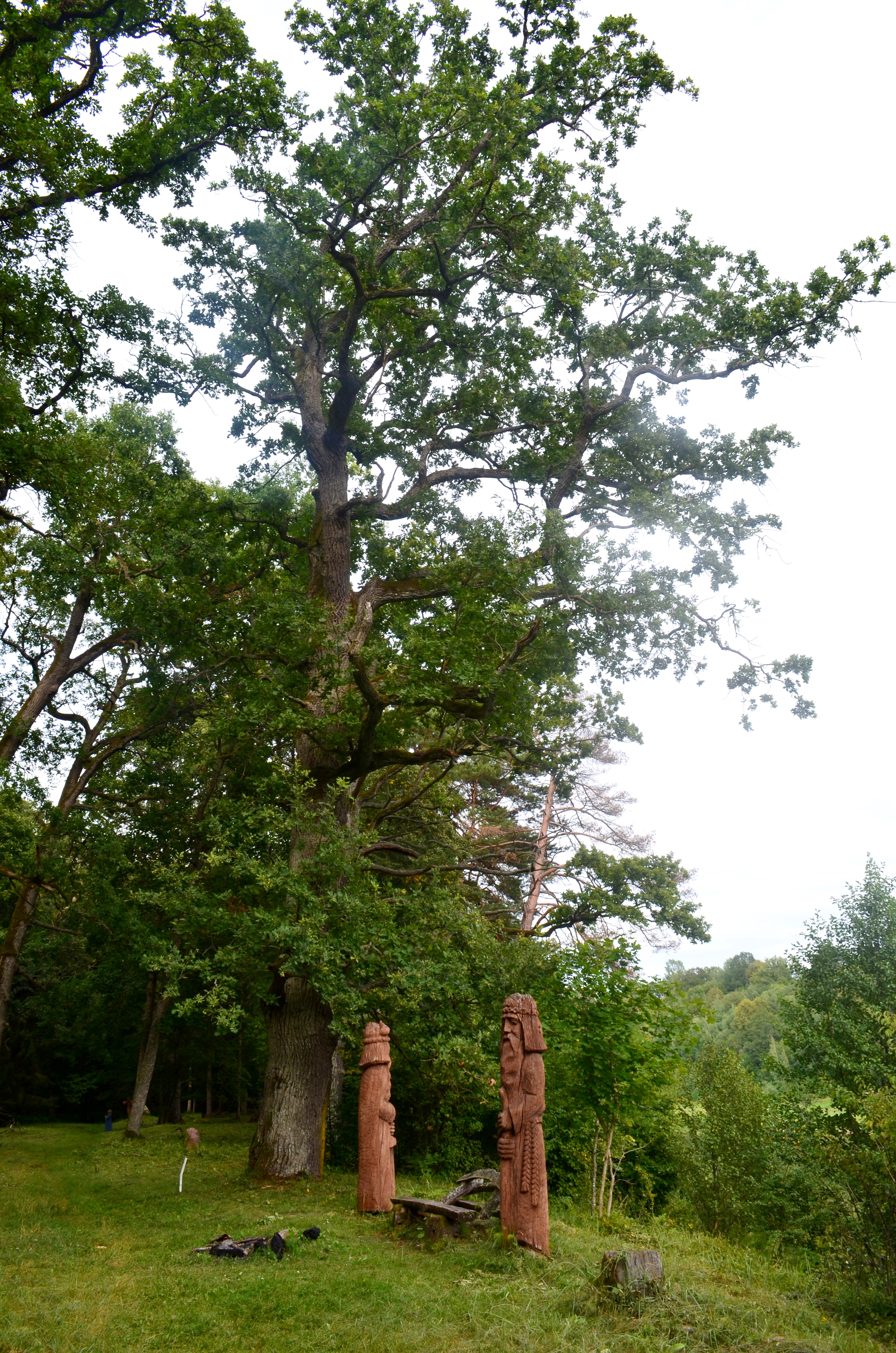 Punios šilas, Alytaus raj.